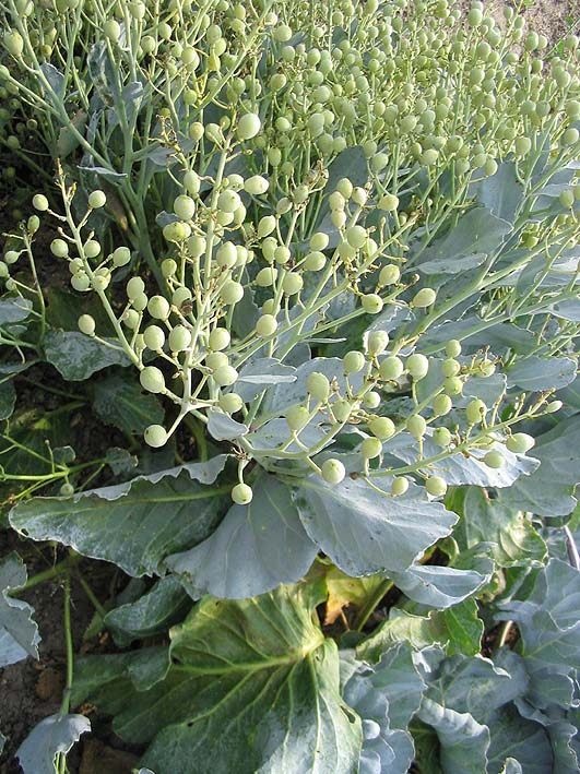 Crambe maritima L. (chou marin), feuilles et fruits Photo prise au parc botanique de Meise en août 2004 Jean Tosti 09/2004